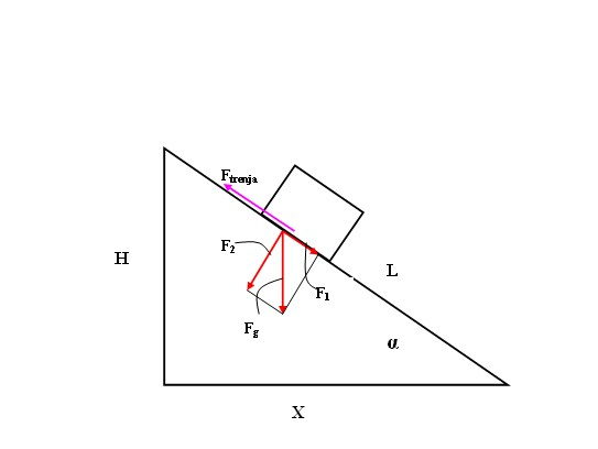 Kosina kad predmet miruje